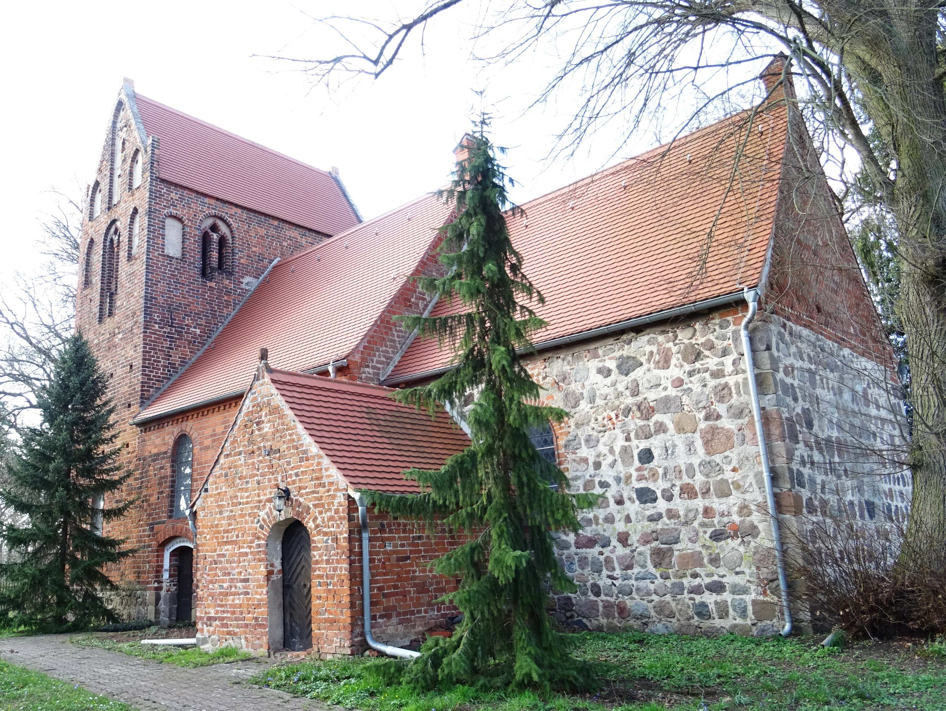 Calberwisch, Stadt Osterburg (Altmark), Kirche von Südosten